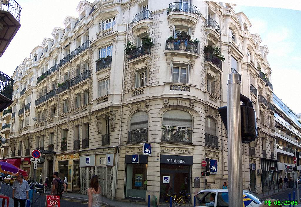 Nice-Quartier des Baumettes ou des Musiciens Palais Arnulf, 95 Rue de France, angle rue ? Quartier des Musiciens Face Nord donnant sur la Rue de France Prise de vue matin circa 10h direction SE Vue générale